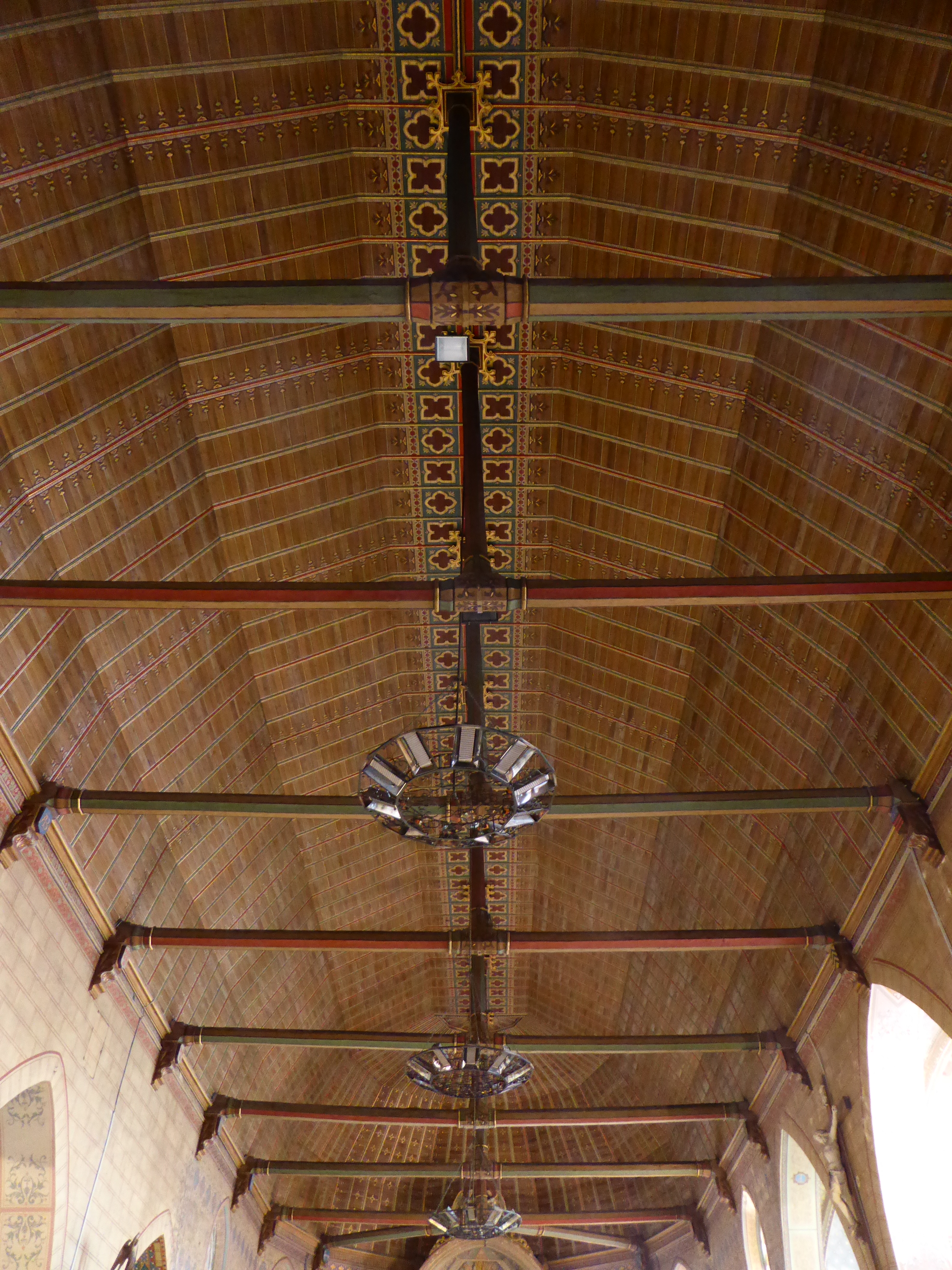 Plafond de la nef de l'église Saint-Sauveur de Bellême, dans l'Orne, en France.